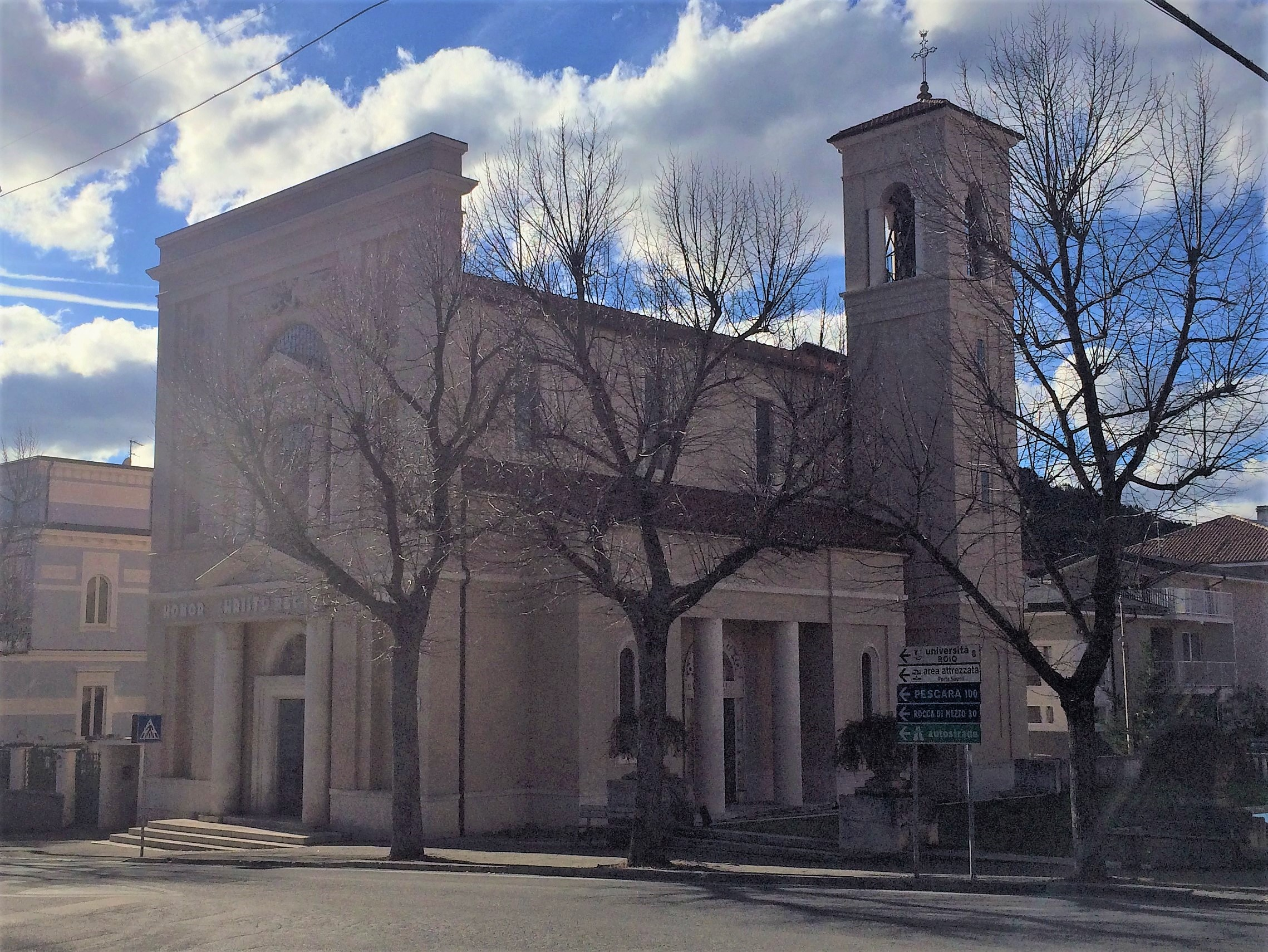 La chiesa di Cristo Re in viale Francesco Crispi, L'Aquila.